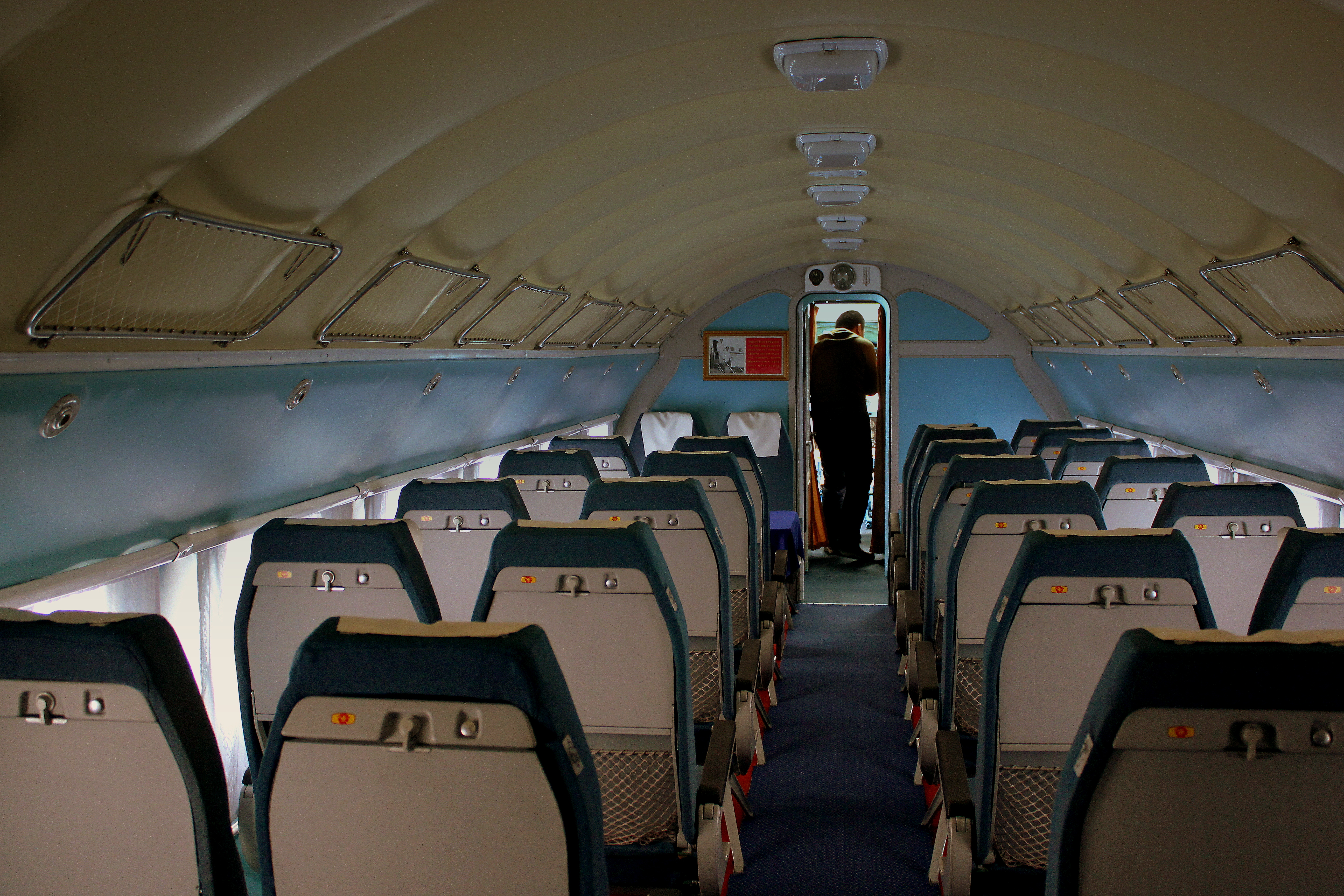 AIR KORYO IL14 P535 CABIN VIEW PYONGYANG SUNAN AIRPORT DPRK NORTH KOREA OCT 2012